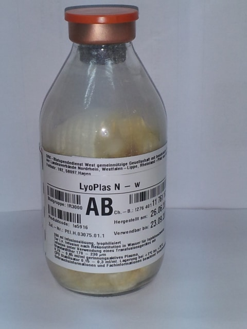 דובר צה"ל עירוי פלזמה מיובשת